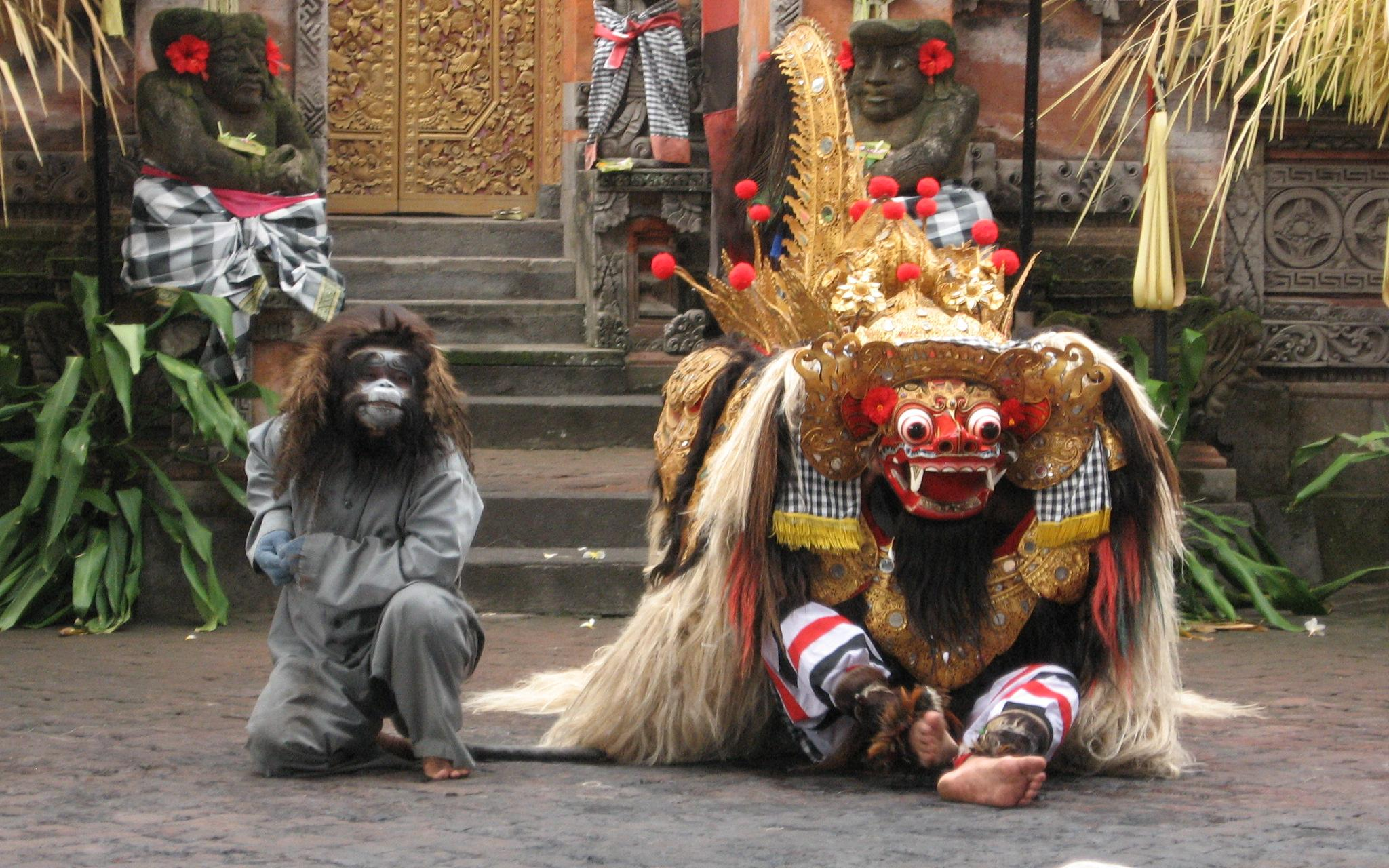 Barong dance in Bali